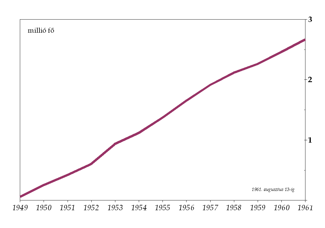 A Berlinen keresztül emigráló NDK-polgárok száma egy évtized alatt a Berlini fal című cikk adatai alapján